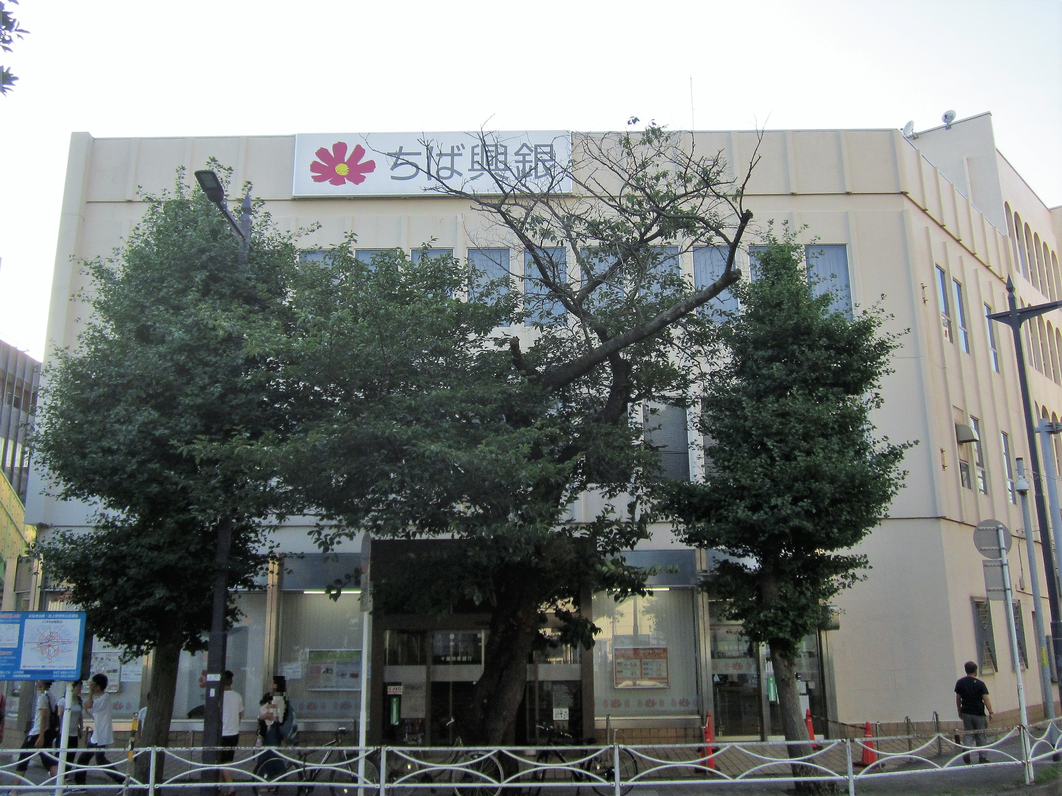 千葉興業銀行八千代支店（八千代市八千代台北）